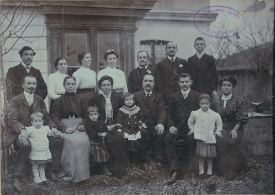 Сватбата на фотографа Крум Савов в Пловдив.